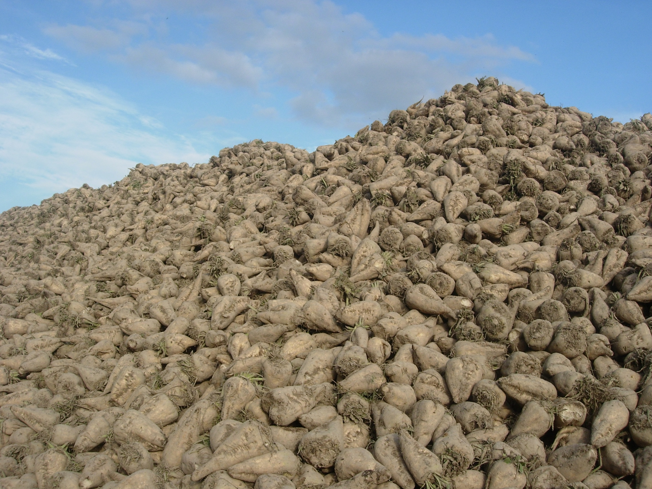 Récolte des betteraves à Saint-Flavy (Aube)